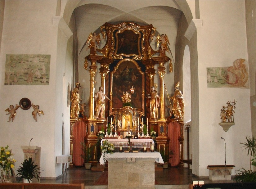 Messaltar und barocker Hochaltar in der Katholischen Pfarrkirche St. Johannes in Brendlorenzen. Die Kirche zählt zu den ältesten in Deutschland.